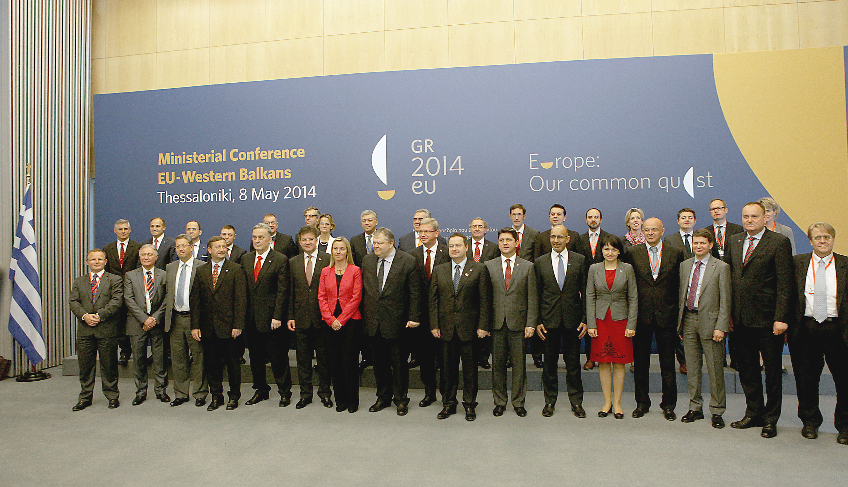 Την Πέμπτη 8 Μαΐου πραγματοποιήθηκε στη Θεσσαλονίκη η Άτυπη Υπουργική Διάσκεψη Ευρωπαϊκής Ένωσης-Δυτικών Βαλκανίων (Οικογενειακή φωτογραφία). ΠΗΓΗ: ΑΠΕ-ΜΠΕ